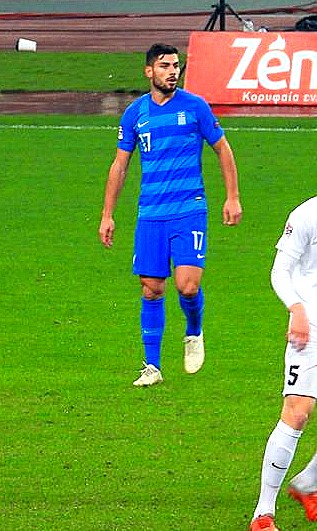 My photo!!!!